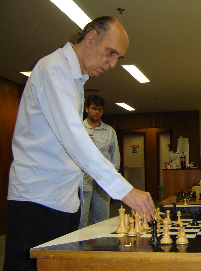 Mestre FIDE Marcos Asfora no Torneio de Enxadrismo ASBAC, em Recife.